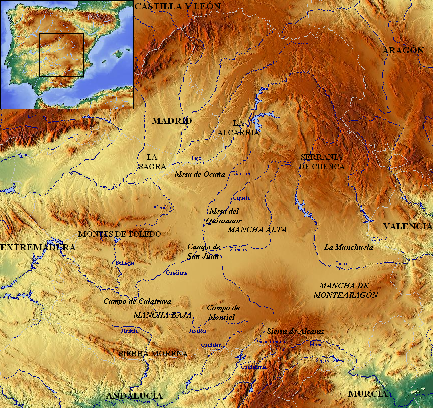 Mapa físico centrado en la comunidad autónoma española de Castilla-La Mancha, que muestra las principales áreas, comarcas y accidentes geográficos de La Mancha (en cursiva) y de territorios adyacentes.